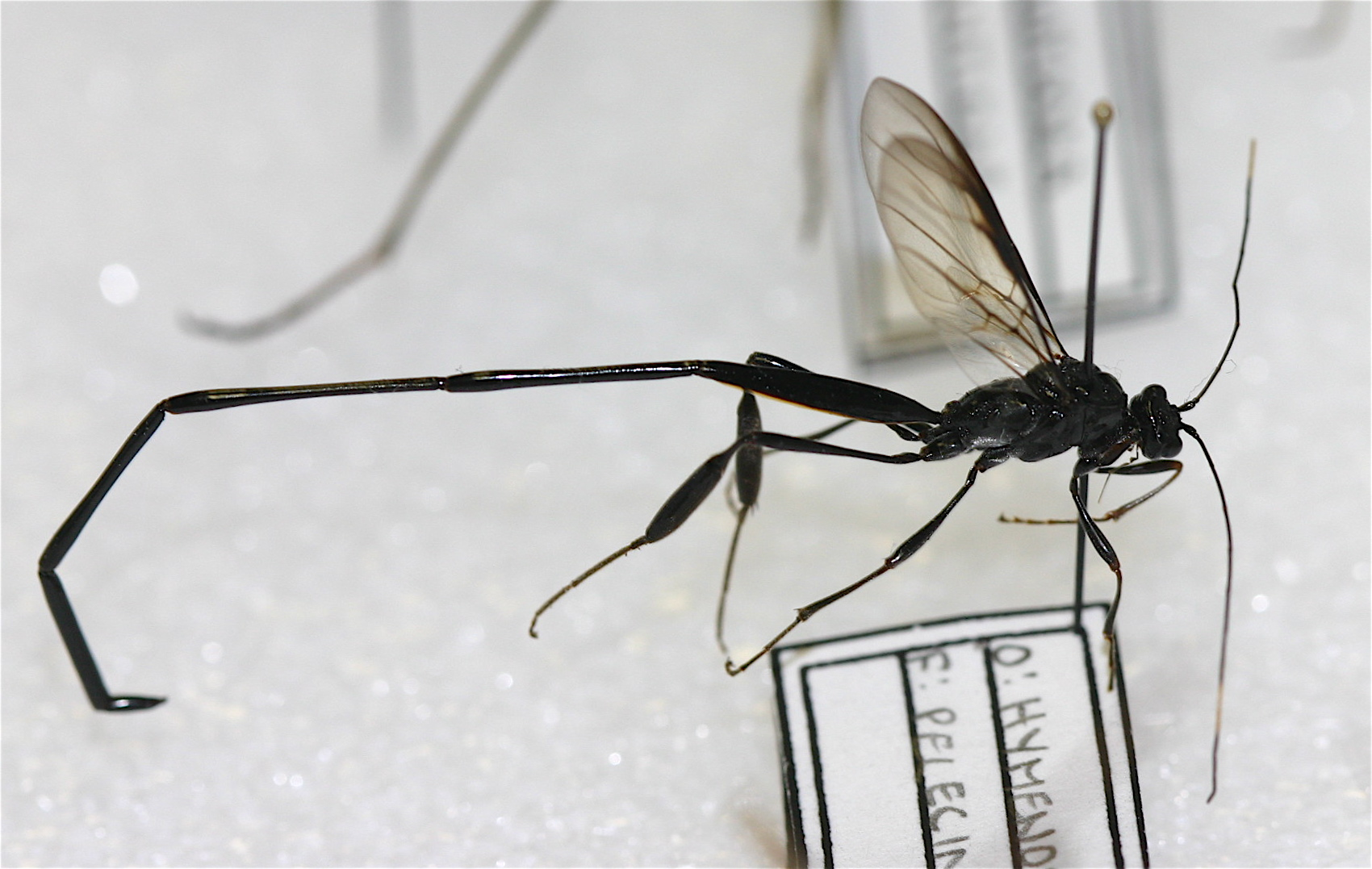 Hymenoptera - Pelecinidae - Pelecinus polyturator